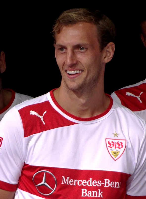 Georg Niedermeier beim Saison Opening 2012. Aufgenommen von